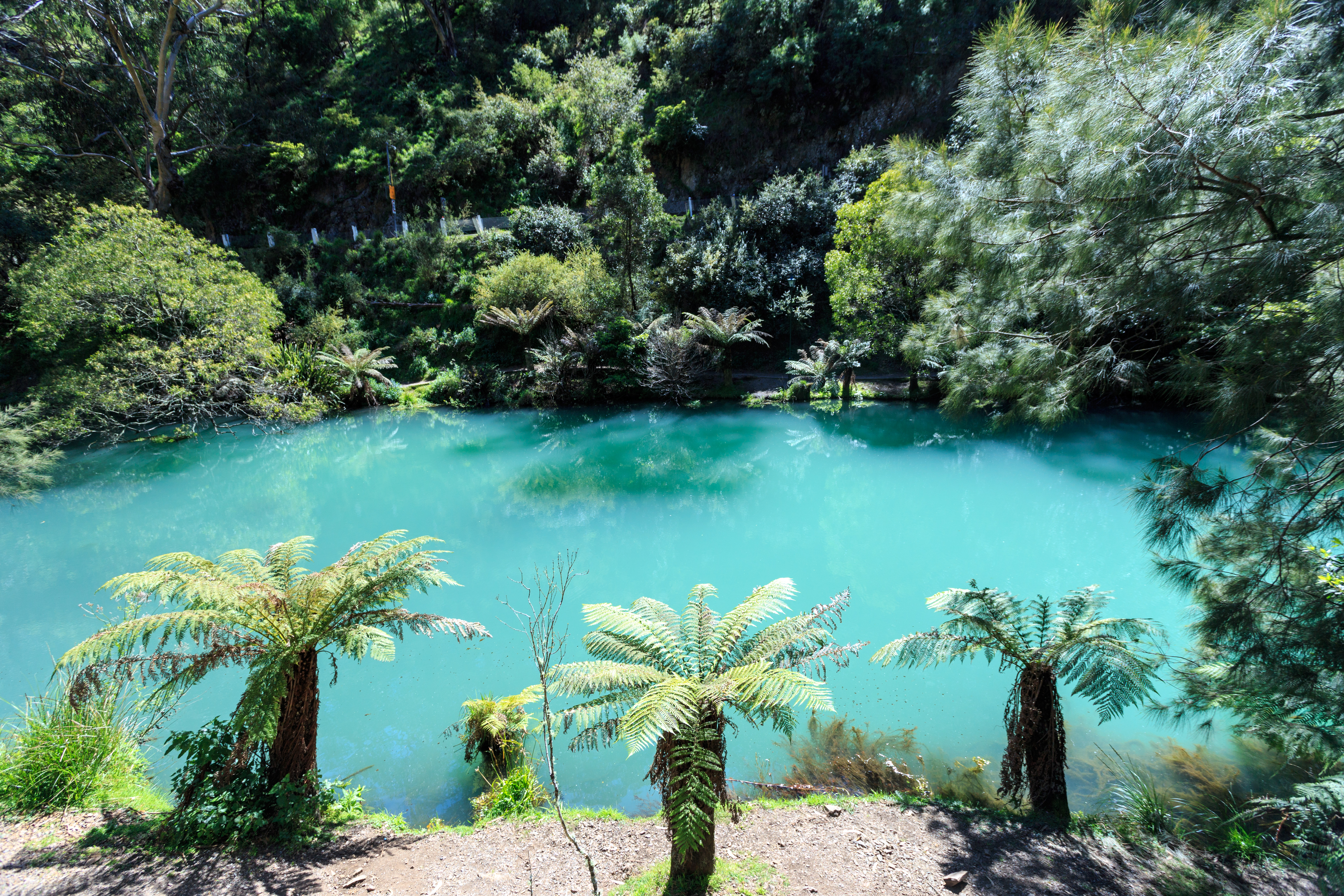 Jenolan River nahe der Jenolan Caves